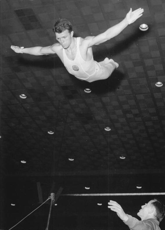 Erwin Koppe Zentralbild Kohls Ko-Ki. 3.11.1963 7. Werner-Seelenbinder-Gedenkturnier. Interessanten Aufschluß über den derzeitigen Leistungsstand in der olympischen Pflicht für Tokio 1964 gab es in der Meisterklasse der Männer und Frauen am 2.11.63 in der Berliner Dynamo-Sporthalle. Karin Mannewitz und Klaus Köste führen nach der Pflicht. UBz: Erwin Koppe (SC DHfK) beim Abgang vom Reck.